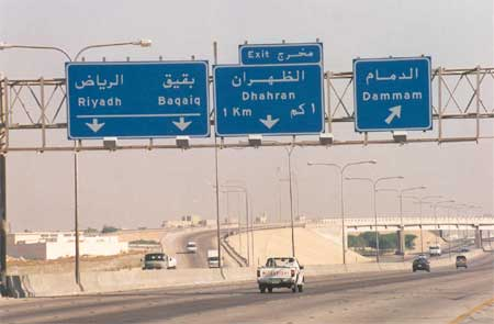 Autopista Dhahran-Al Khobar On the Dhahran-Al Khobar Highway